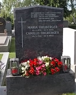 Camillo Öhlberger - Baumgartner Friedhof (8-452)